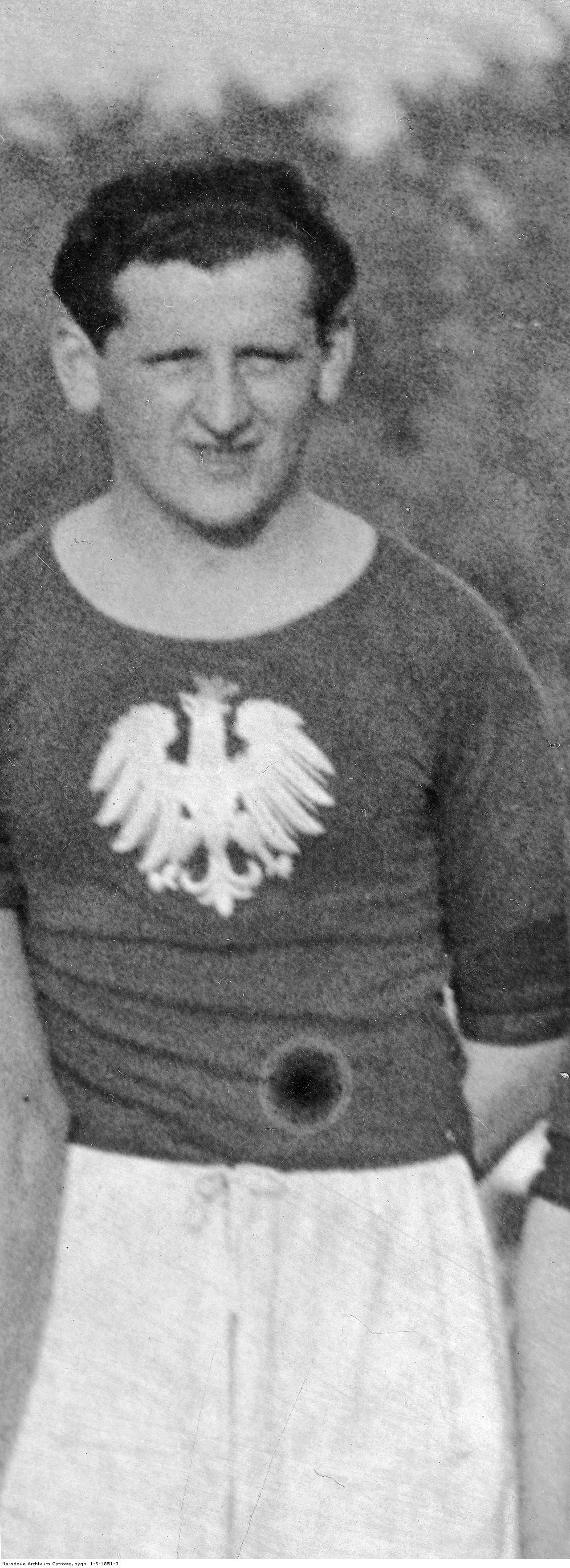 Karol Kossok, piłkarz w stroju reprezentacji Polski. Fotografia sytuacyjna.